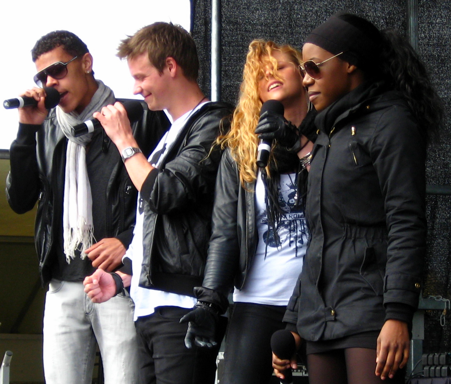 Alien Beat Club (Kasper Spring Ehlers, Marcel Mark Gbekle, Patricia Namakula Mbabazi og Stephanie Lykkehøj Gudmundsen) @ Skovmand & Bues Fødselsdag i Hirtshals